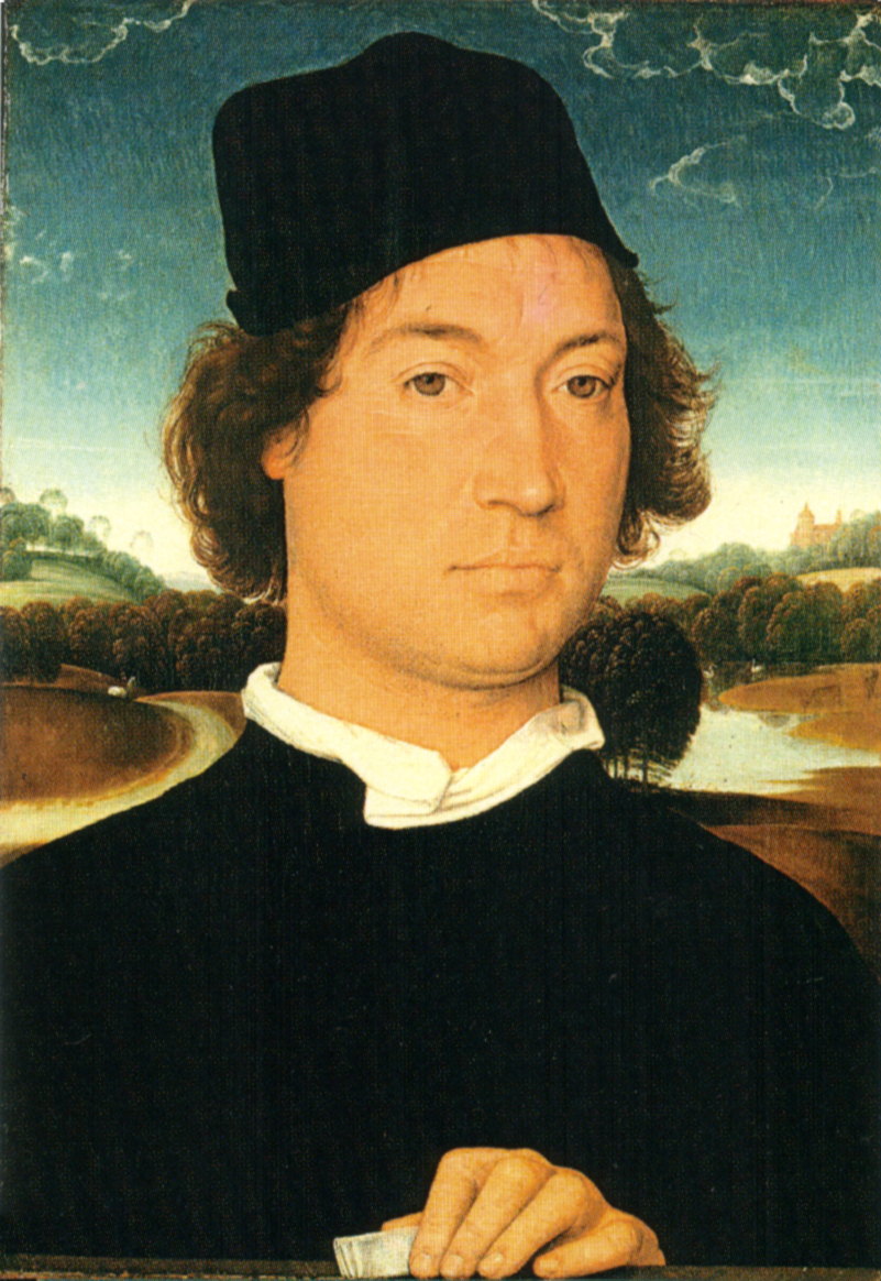 Hans memling, uomo con la lettera, uffizi